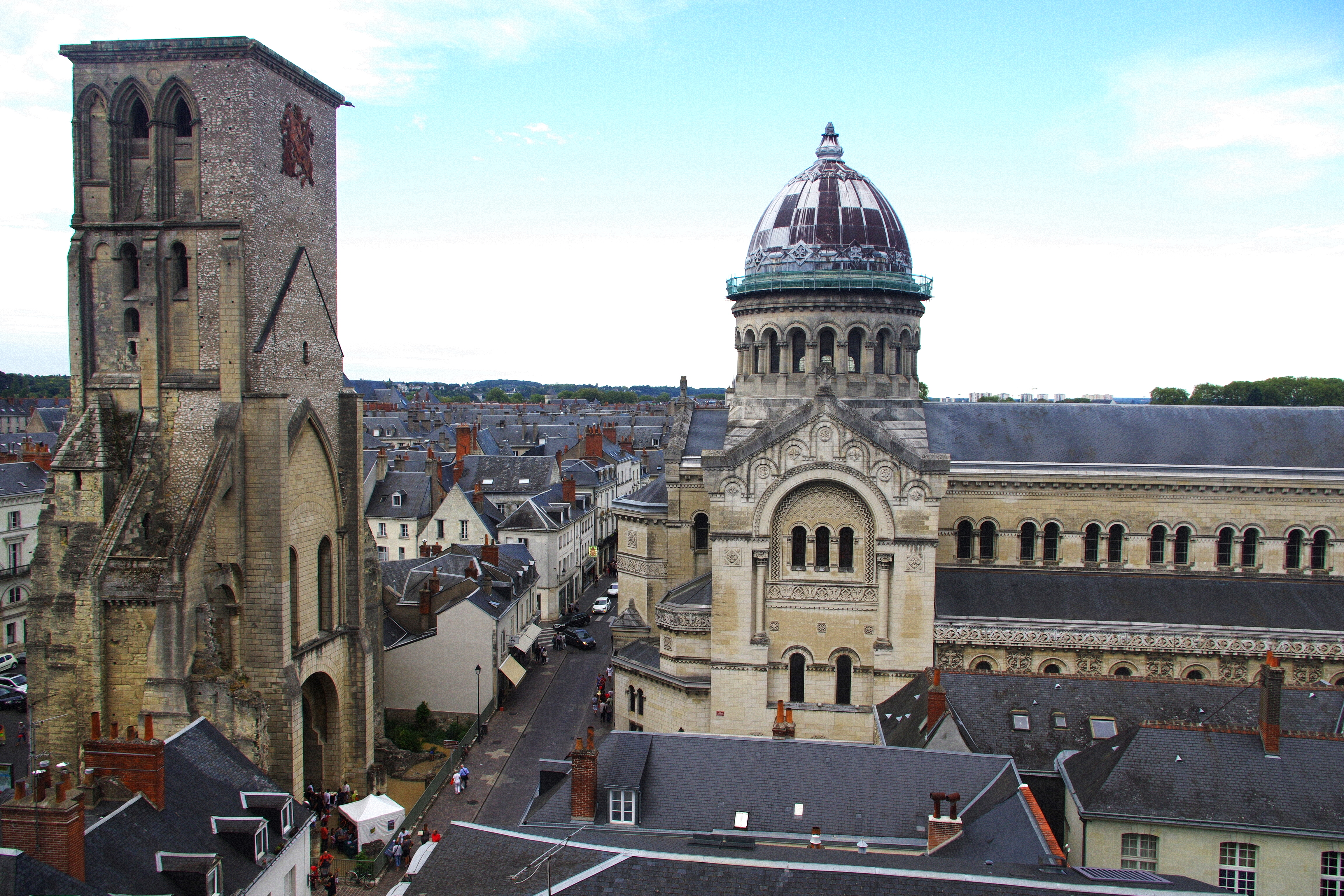 Basilique Saint-Martin